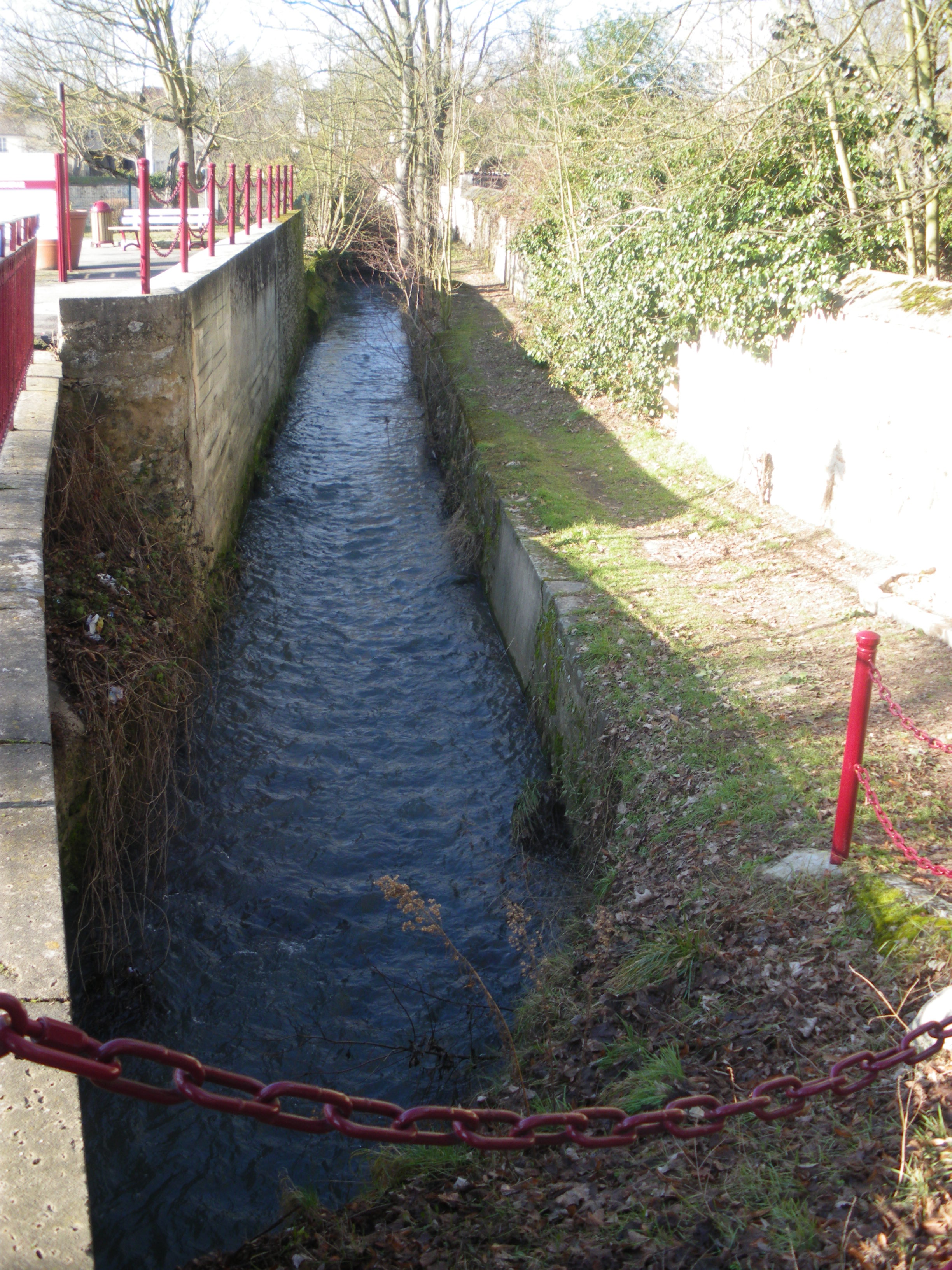 Rivière à Linas, Essonne, France